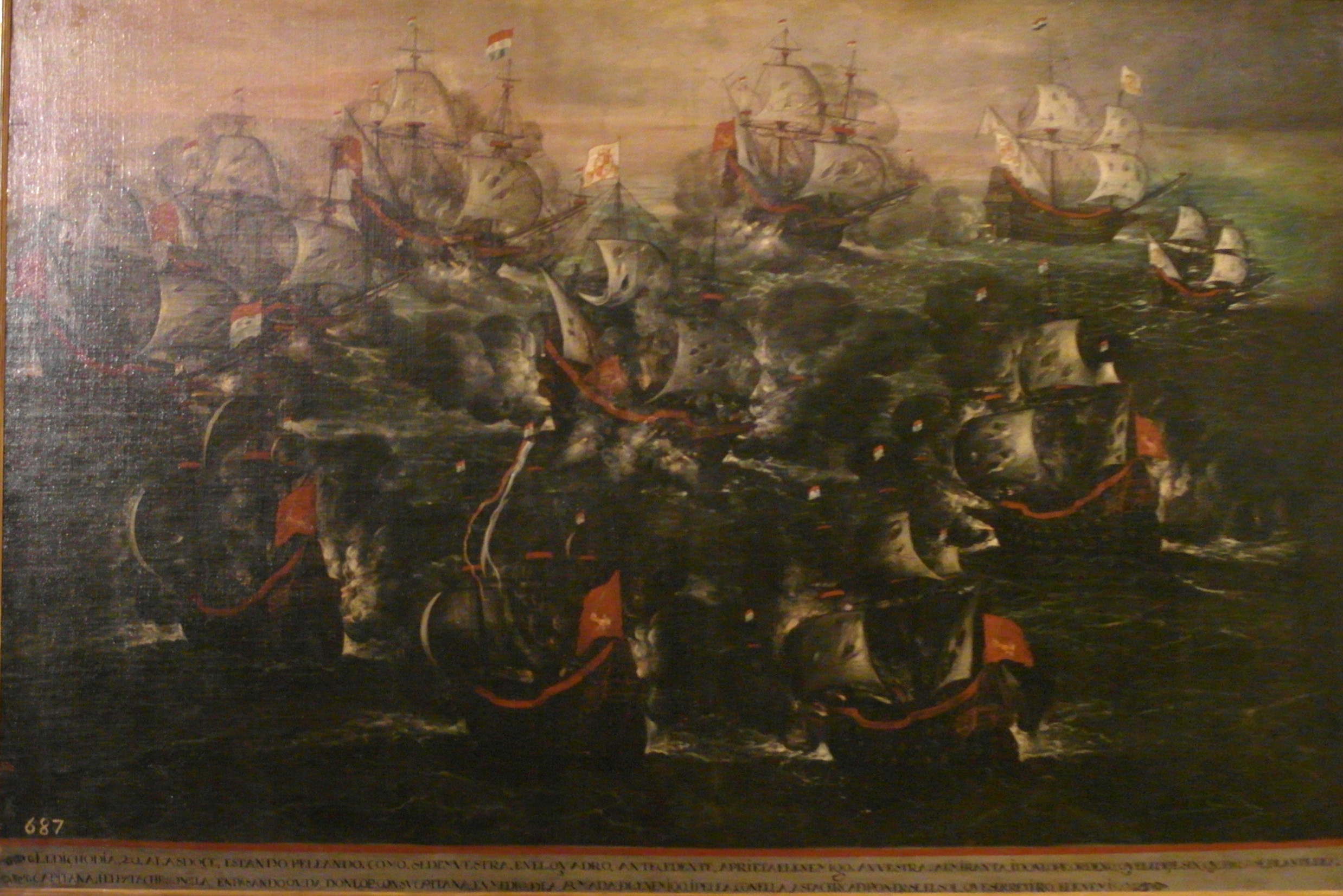 Quinta vista de la campaña del almirante Lope de Hoces en Brasil.